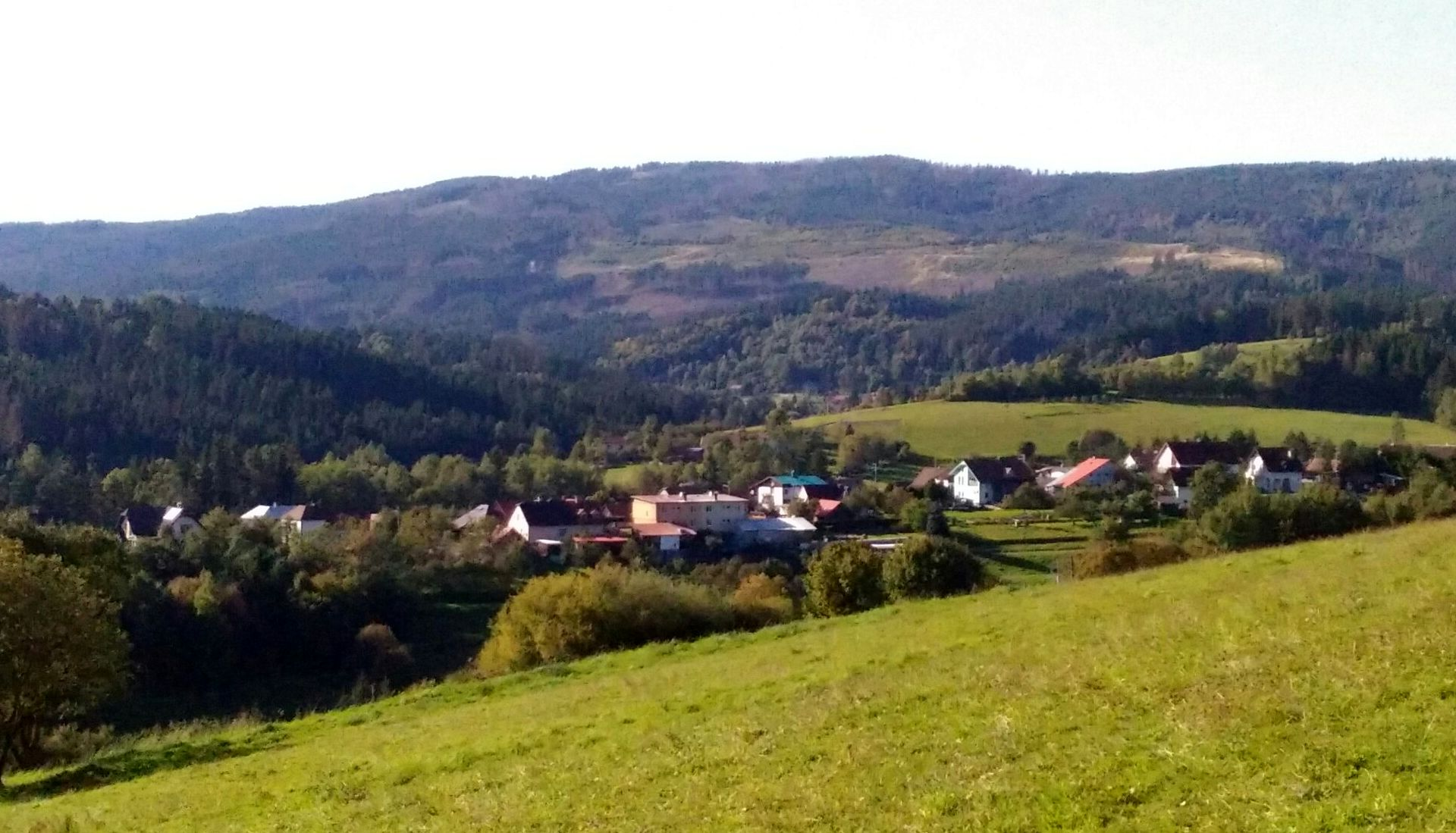 Čadca, mestská časť Milošová, osada Prívarovci